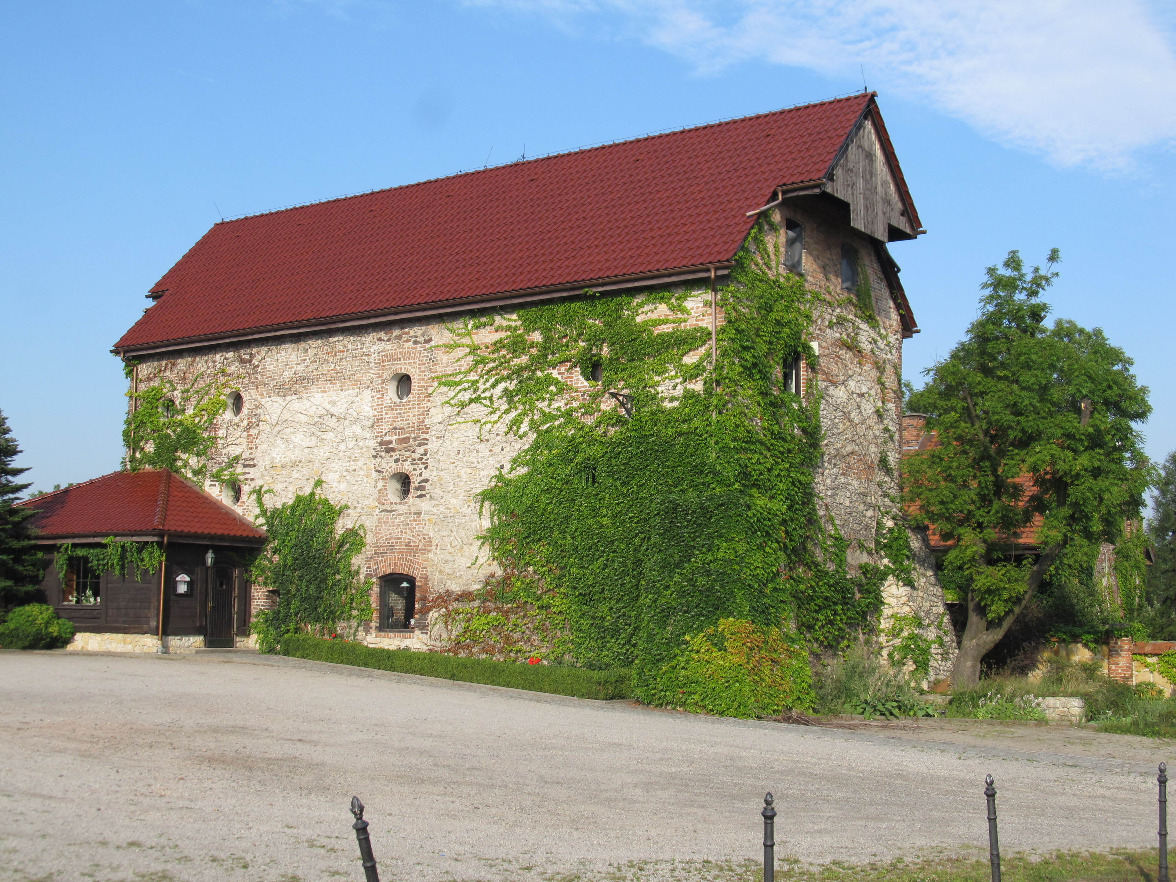 Gliwice Stare Gliwice - spichlerz z XVII w., murowany (zabytek nr A/366/60)